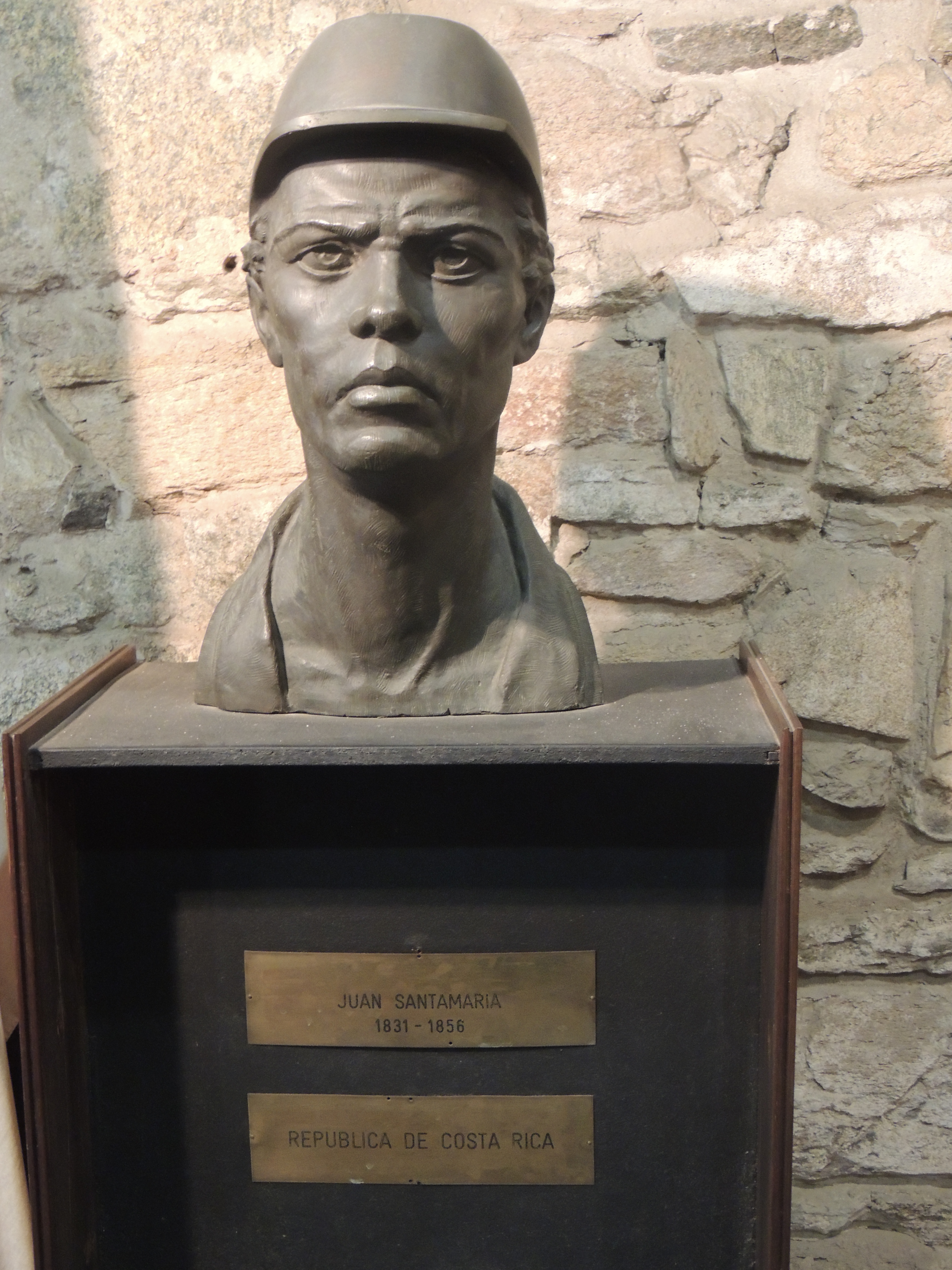 Conjunto de esculturas y pinturas de autores uruguayos del período 1880 - 1945 ubicadas en el Cuartel de Dragones. Ubicada en el departamento de Maldonado